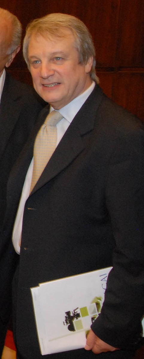 Actor argentino Jorge Marrale